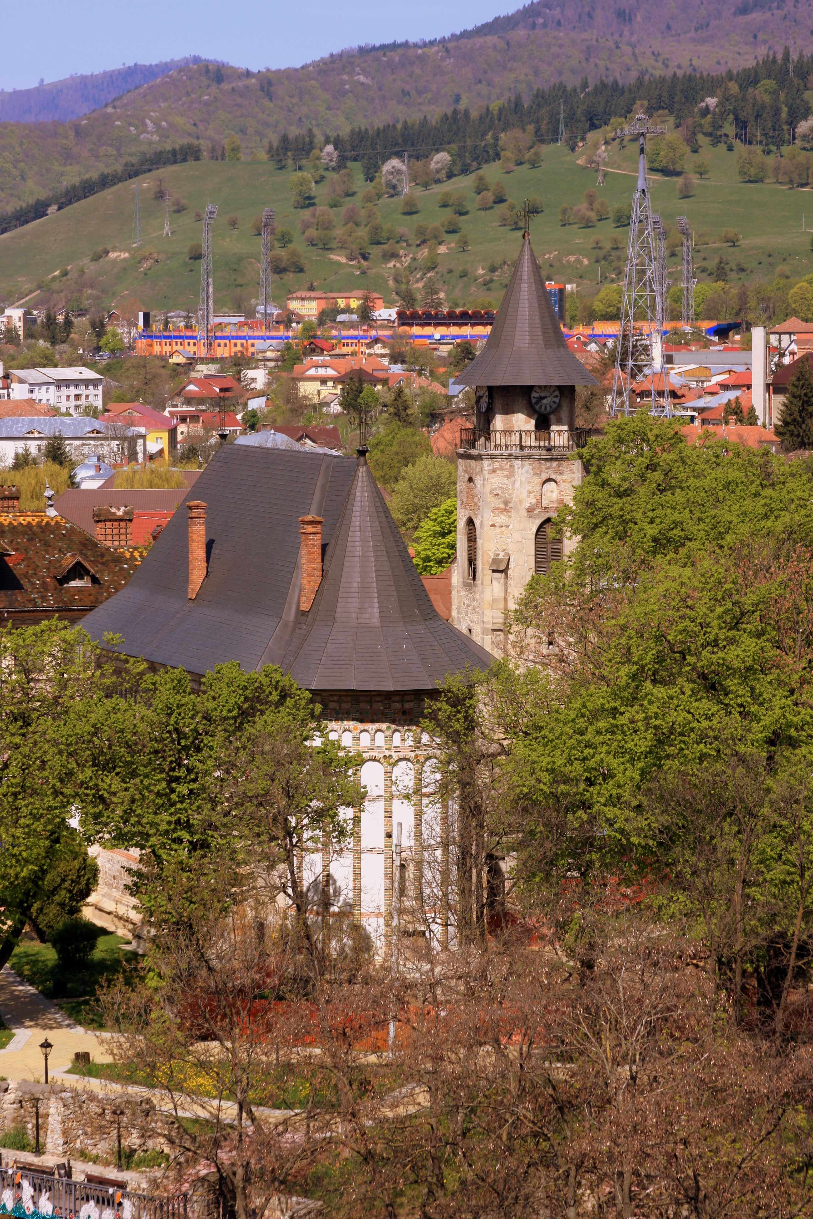 Turn Clopotnita Piatra Neamt 001 NT-II-m-B-10559.02